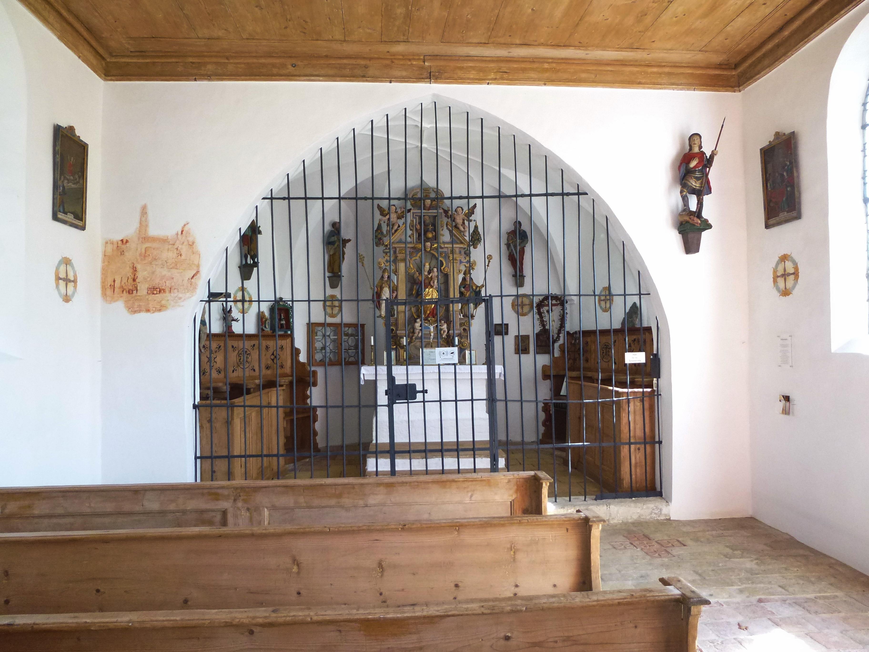 Dießen-Bierdorf_Bierdorf10: Katholische Kapelle Mariä Heimsuchung. Innenansicht zum Altarraum